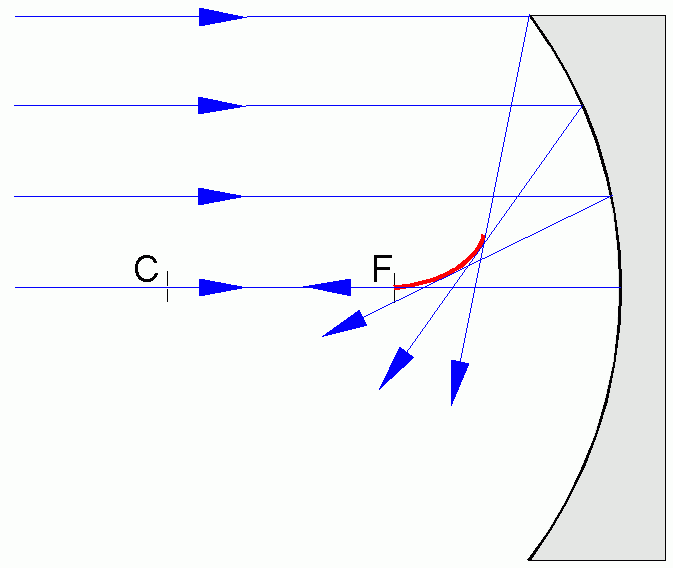 Aberration sphérique du miroir sphérique concave